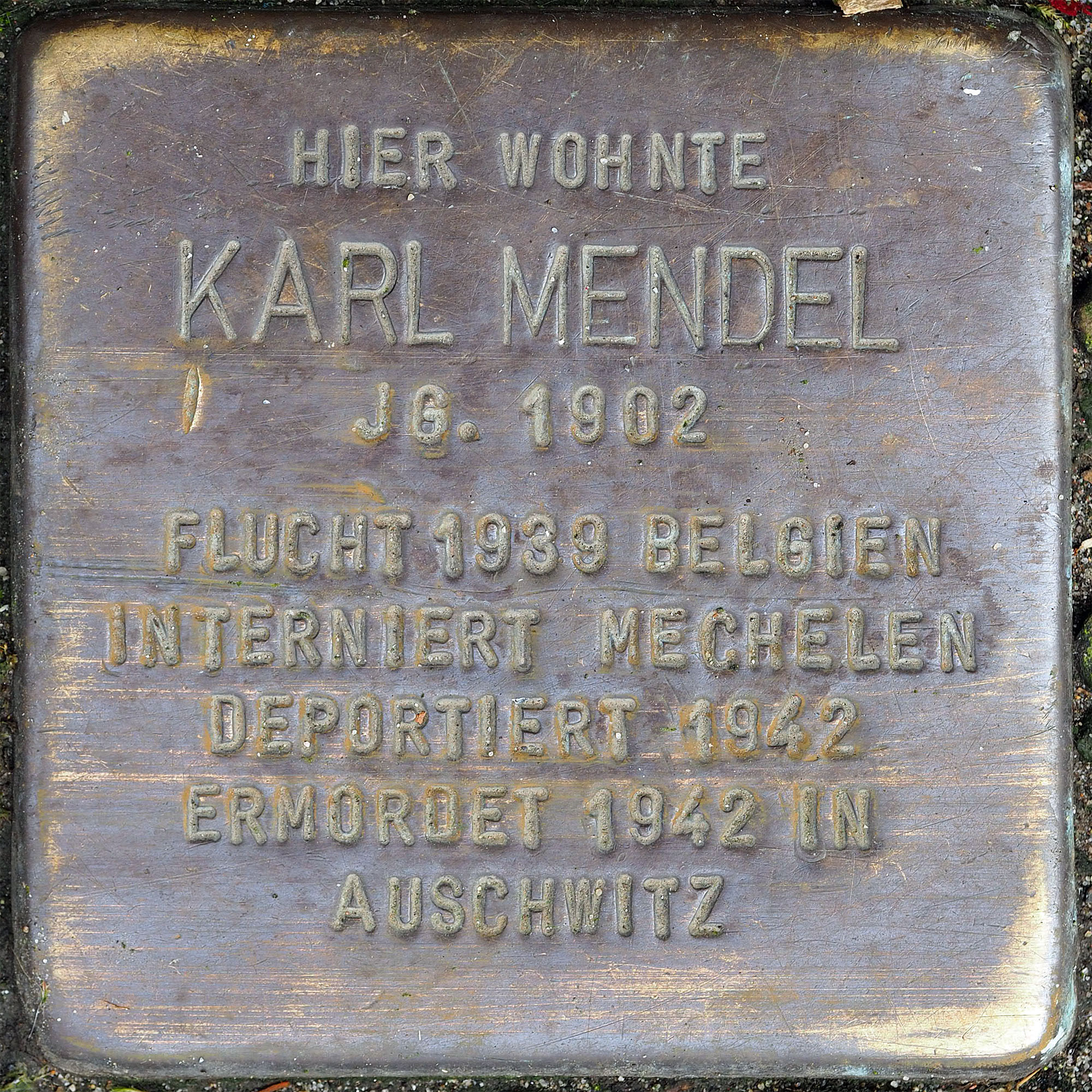 Stolpersteine MG: Mendel, Karl